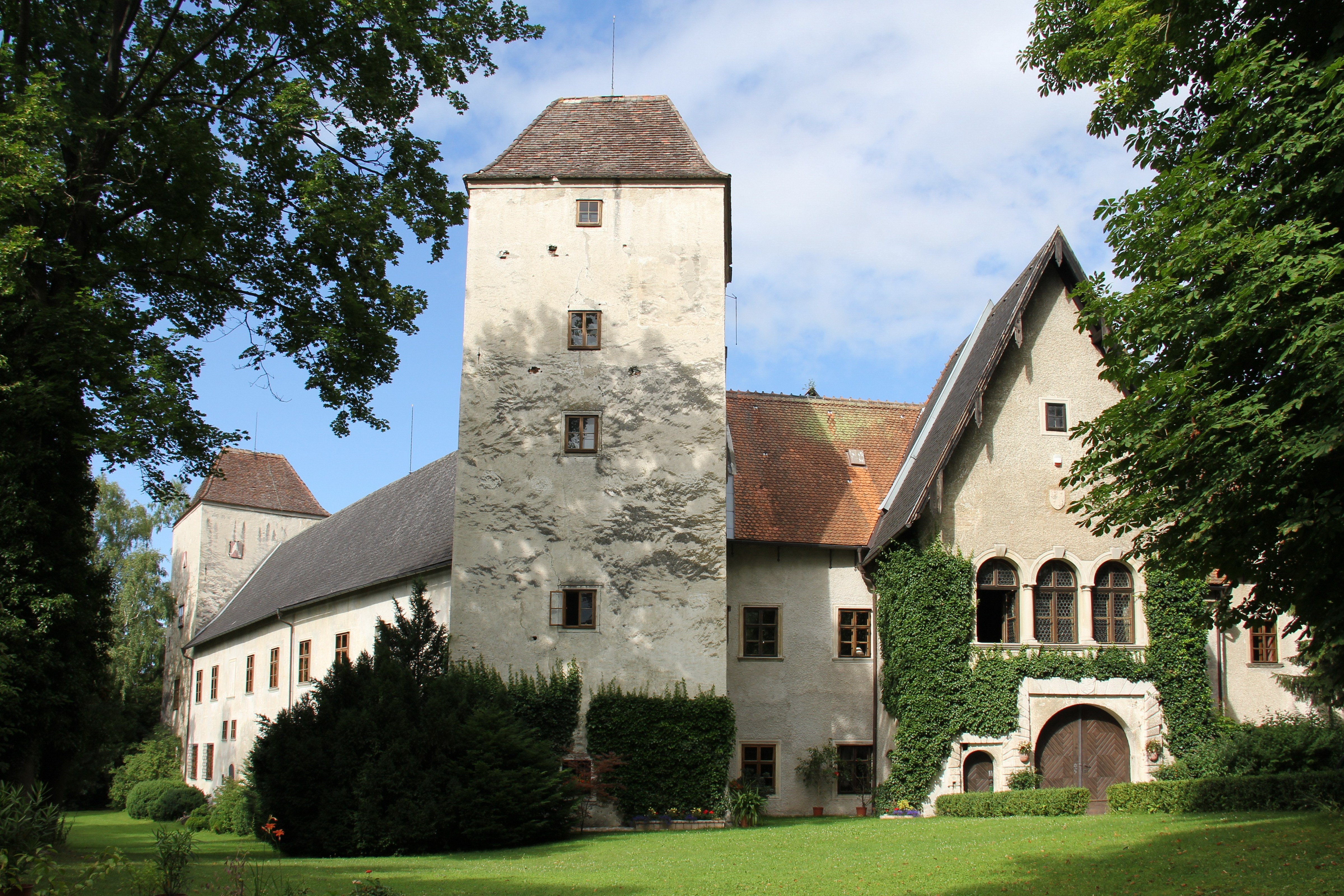 Denkmalgeschütztes Schloss Aspang in Aspang-Markt Object location47° 33′ 21.82″ N, 16° 05′ 33.5″ E